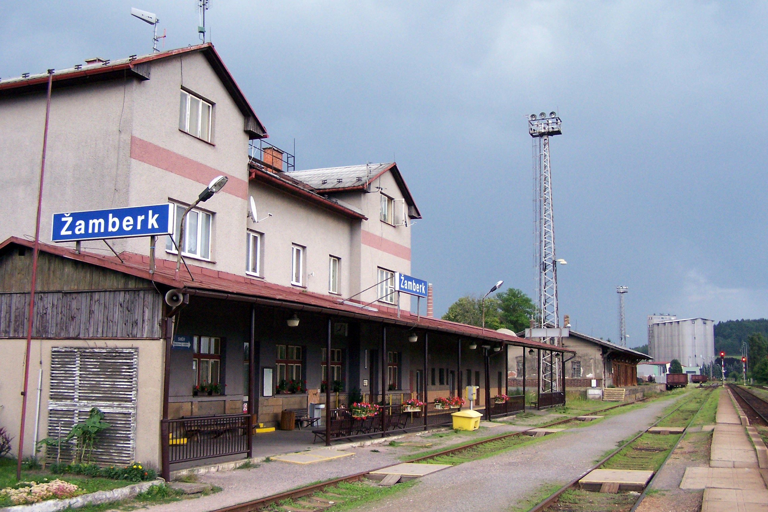 Nádraží v Žamberku.